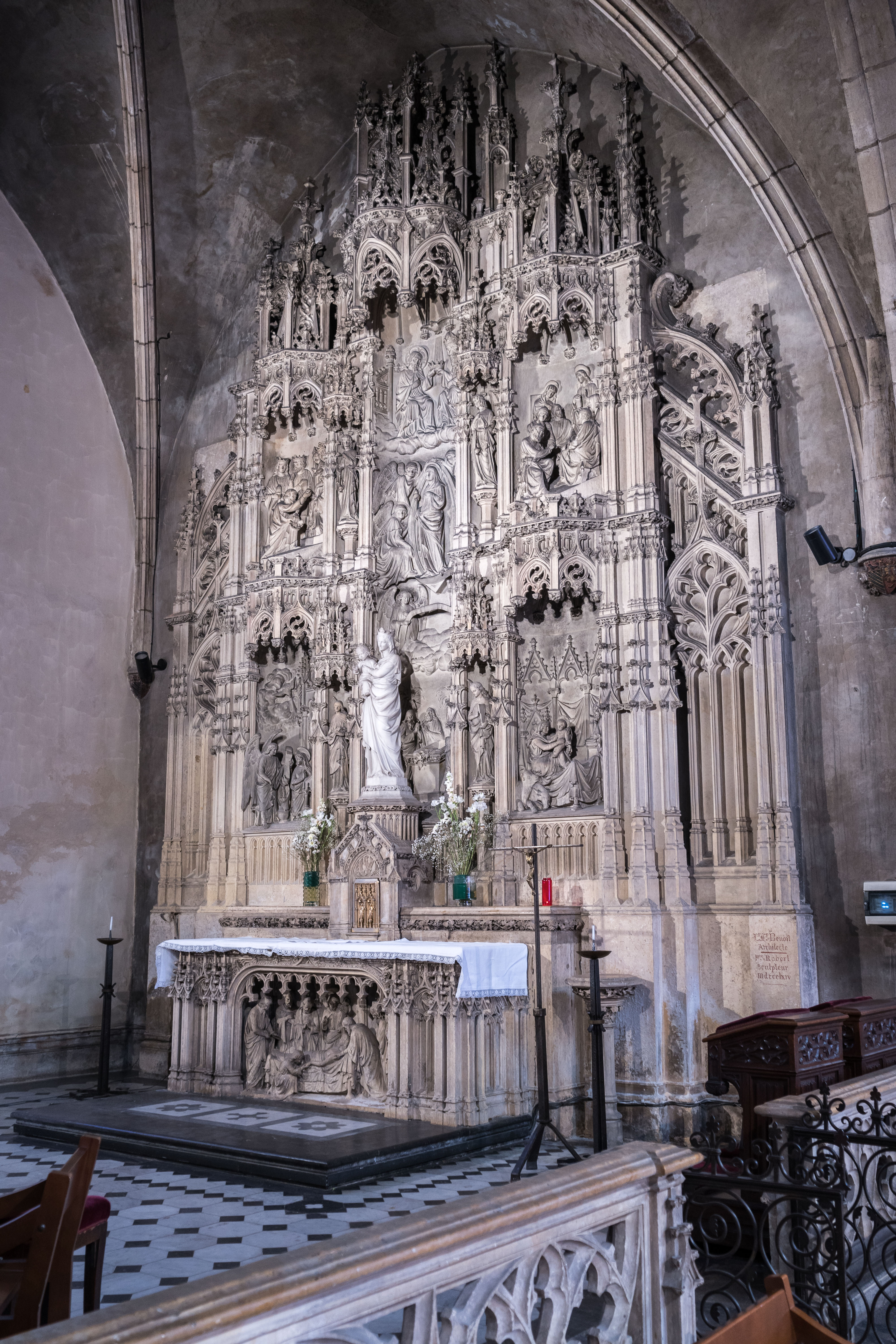 Lyon - église Saint-Bonaventure - Retable avec autel de la chapelle Notre-Dame